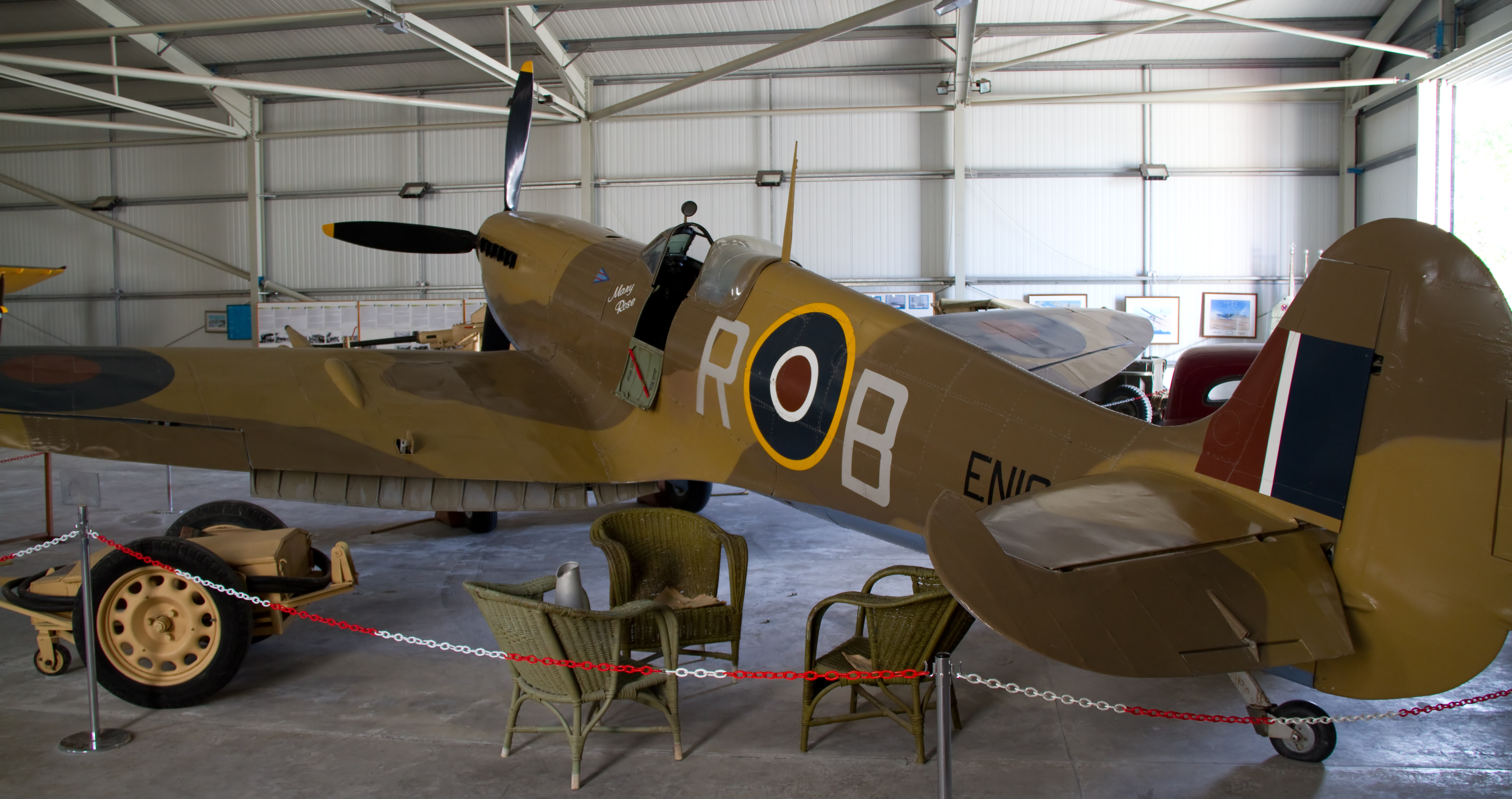 Spitfire MkXI 3